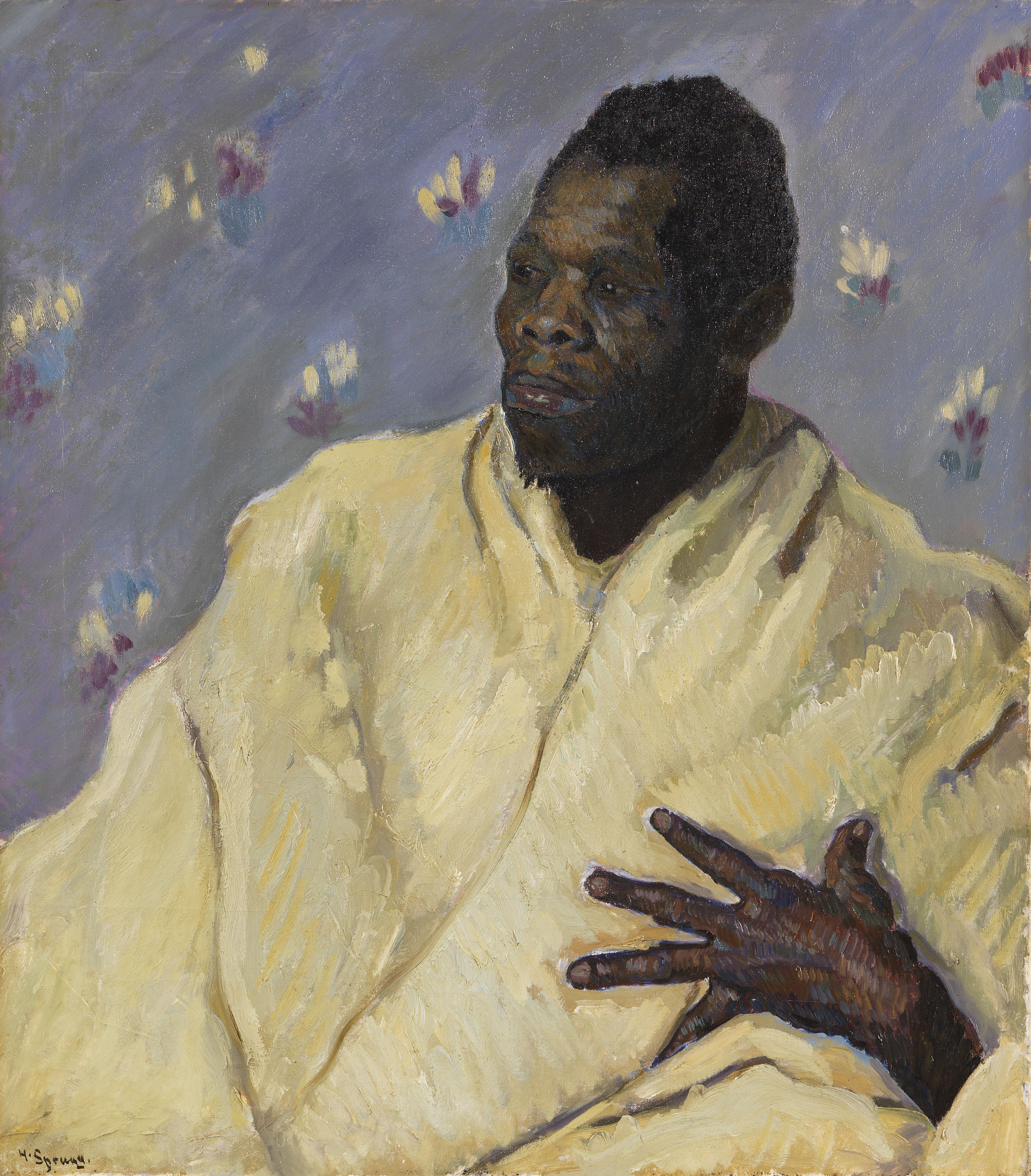 Afrikaner mit weißem Gewand